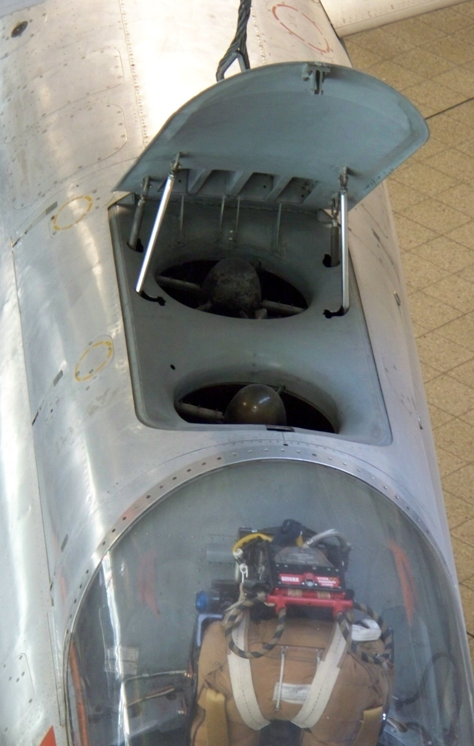 Triebwerk des EWR VJ 101 im Deutschen Museum in München.